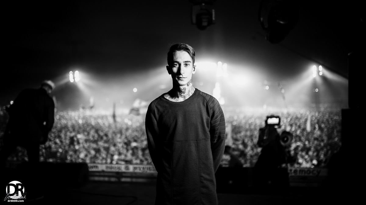 Josh Friend, wokalista zespołu Modestep, na tle ponad 700tys. tłumu, na kilka sekund przed rozpoczęciem koncerteu podczas Woodstock 2015.